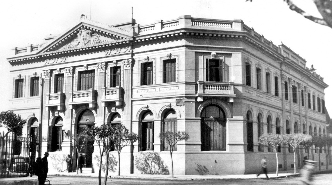 Casa de Gobierno de la provincia, ubicado en calles Pellegrini y Quintana. El edificio fue sede del Poder Ejecutivo hasta el año 1965 a partir del cuál comienza utilizarse como Palacio de Justicia hasta el año 2010. A partir de entonces es sede del Ministerio de Bienestar Social del Gobierno de La Pampa.